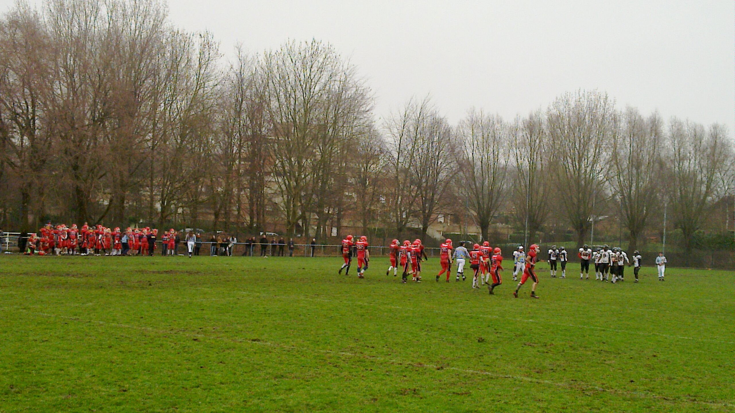 L'équipe des Vikings de Villeneuve d'Ascq, lors d'un match dans le quartier du Château.